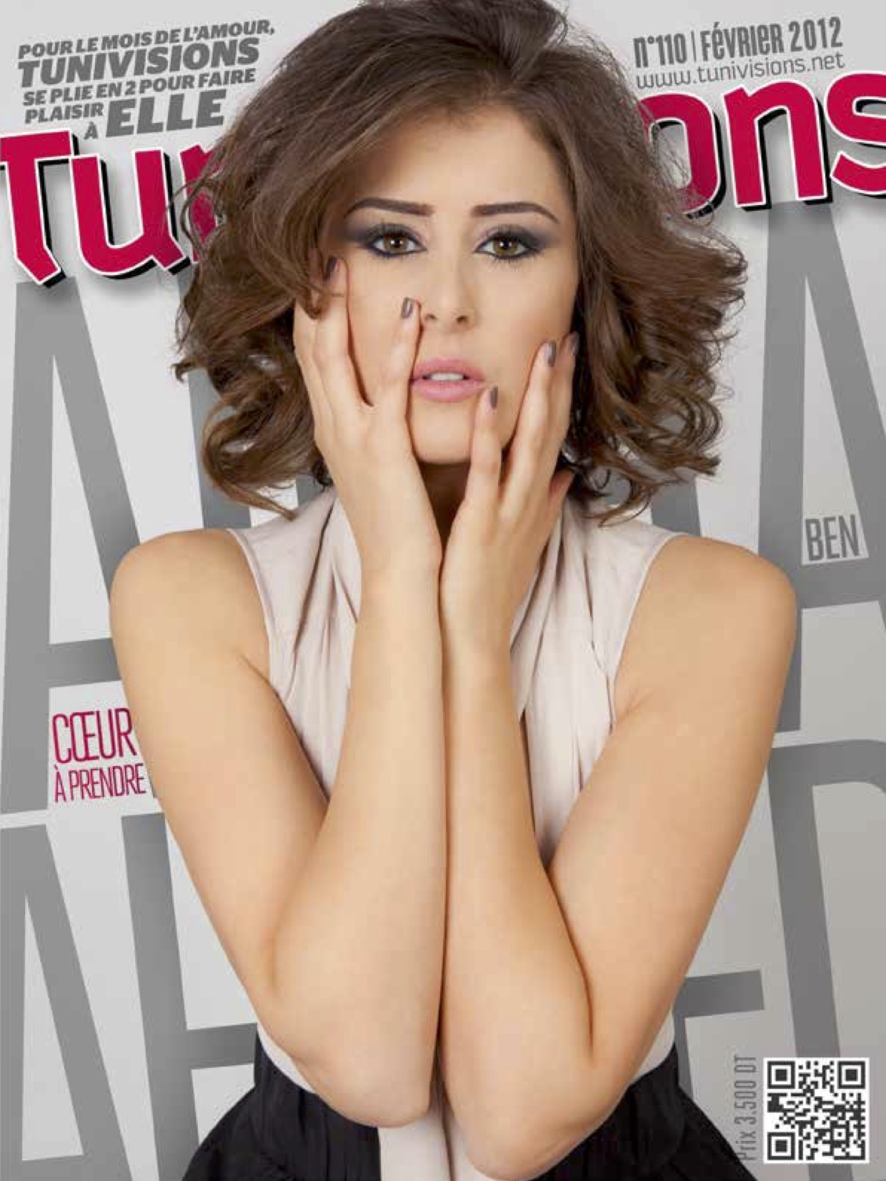 Couverture du numéro 110 du magazine tunisien Tunivisions.